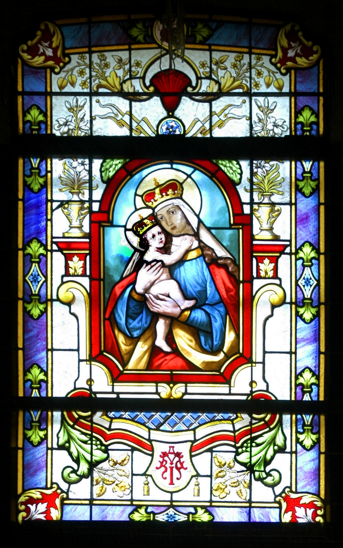 Glasfenster der Maria-Lourdes-Kapelle in der kath. Pfarrkirche hl. Nikolaus in Röschitz